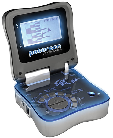 Peterson Tuner Model VS-F StroboFlip